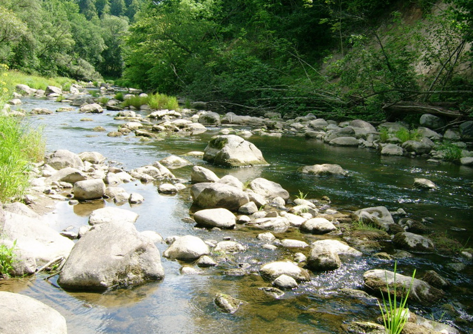 Akmenos Rėva